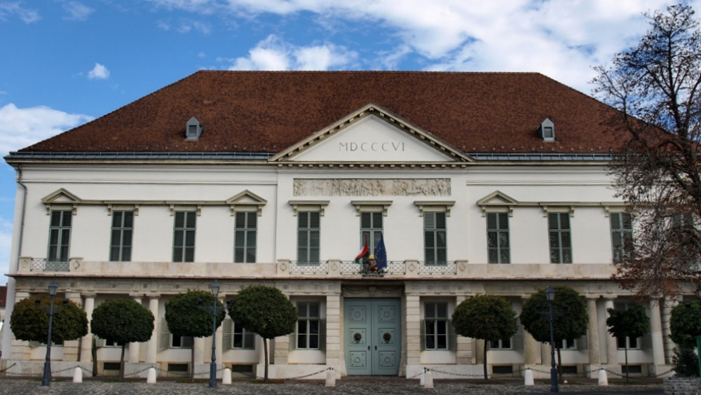 Sándor palota, Budapest, I.ker., budai vár